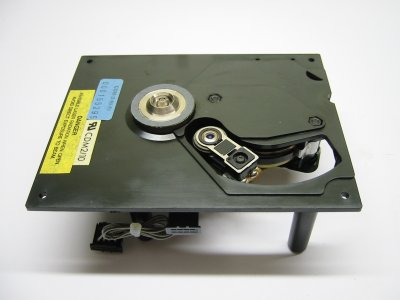 Draufsicht auf Philips CDM 2/10 Laufwerk